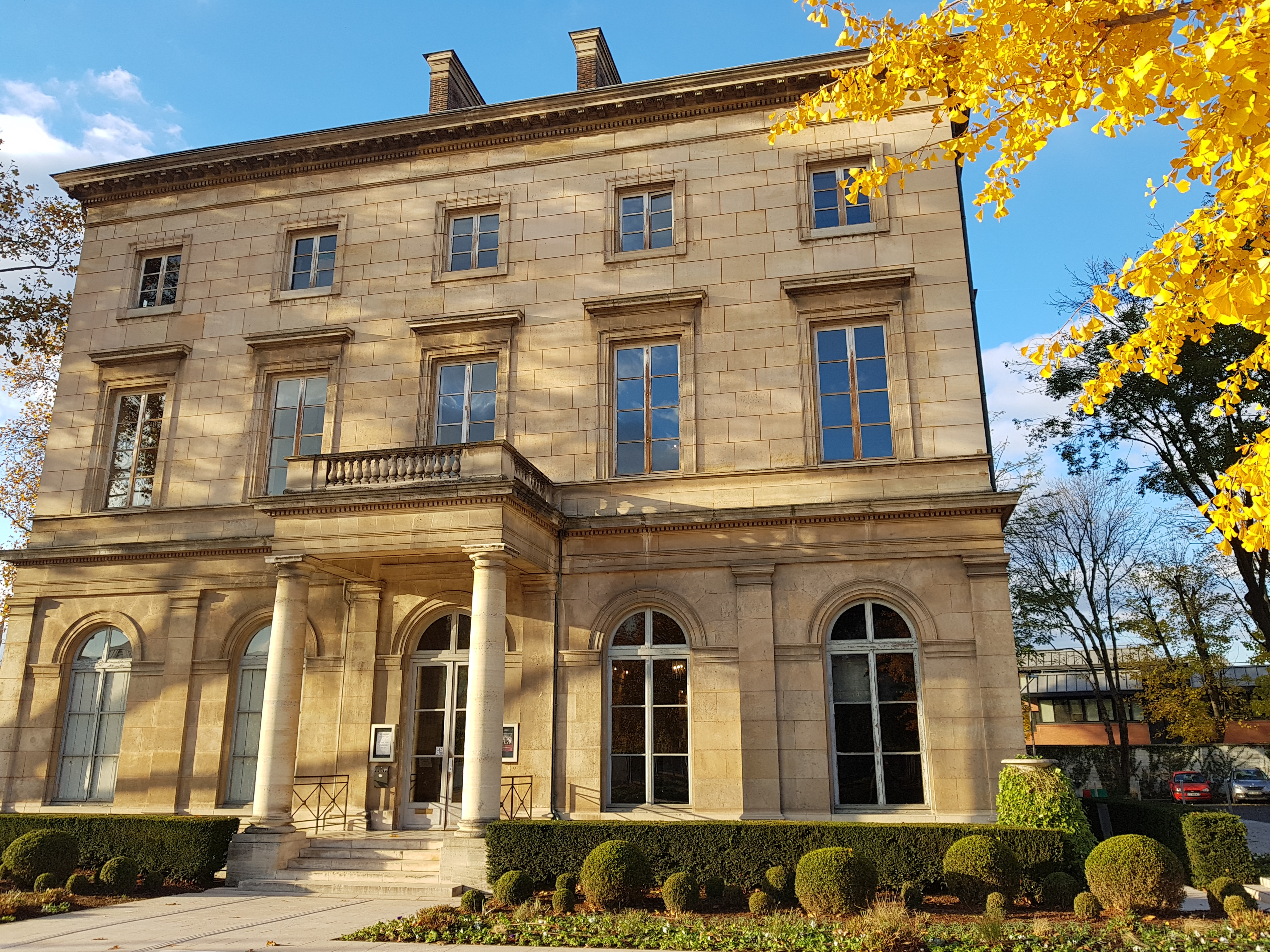 cette photo prise en novembre 2019 montre la façade Sud-Est du château, son porche à deux colonnes doriques supportant un balcon à balustrade. Au premier plan, le feuillage d'un Gingko biloba.